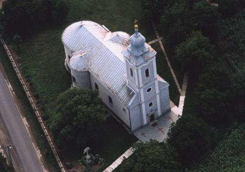 Újfehértó, Hungary, aerialphotgraphy, Örömhírvétel görög katolikus templom